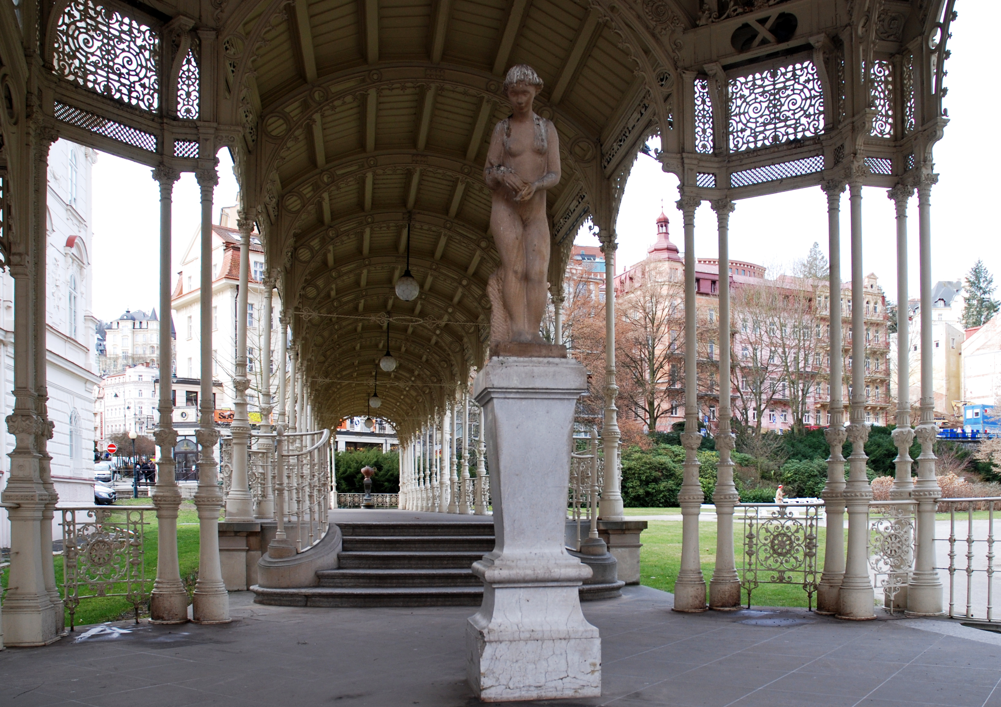 Karlovy Vary, Sadová kolonáda, v pozadí Hadí pramen